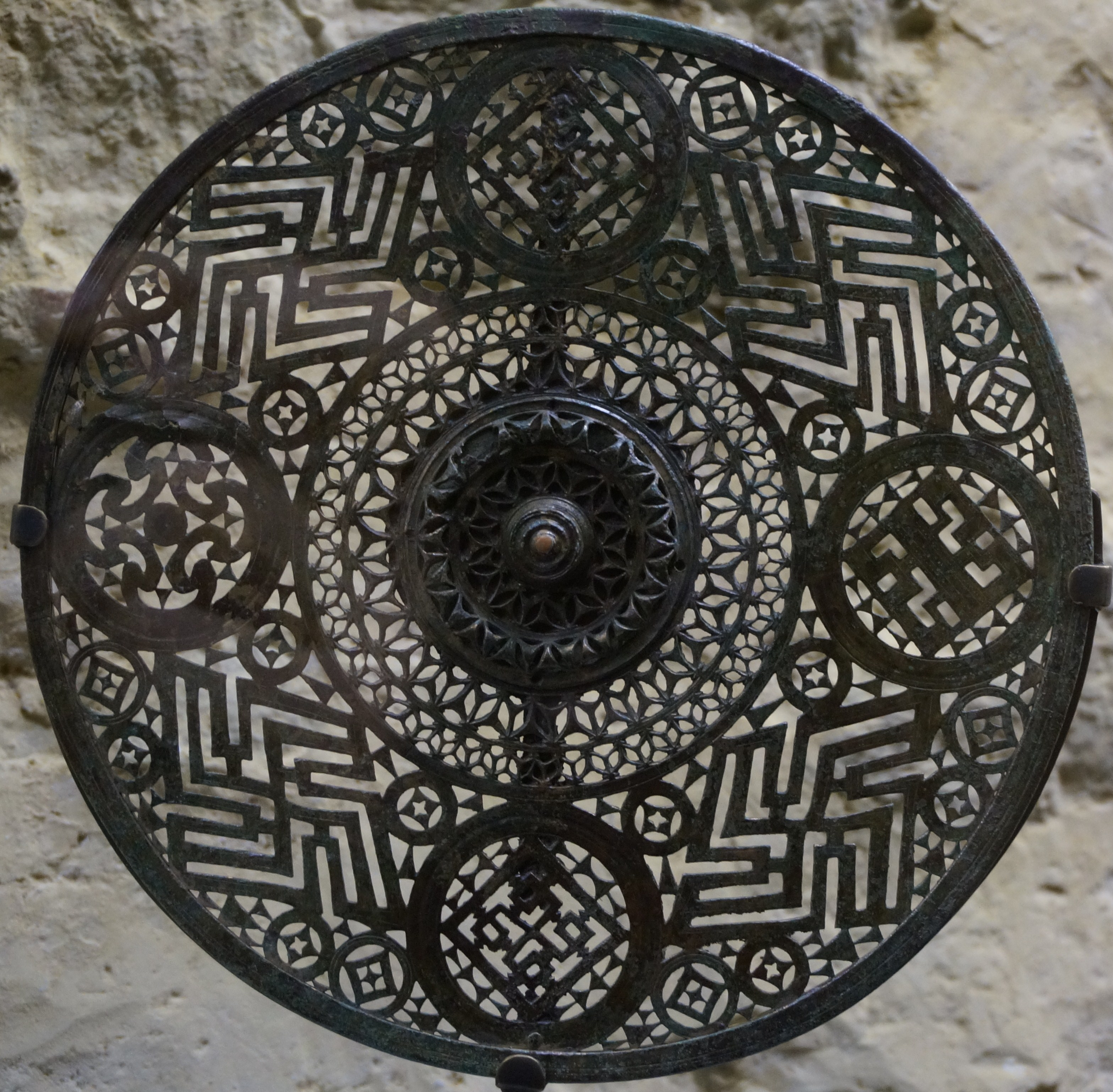 Phalère du Ve siècle avant JC, tombe à char N°1 banière de Bourcq .